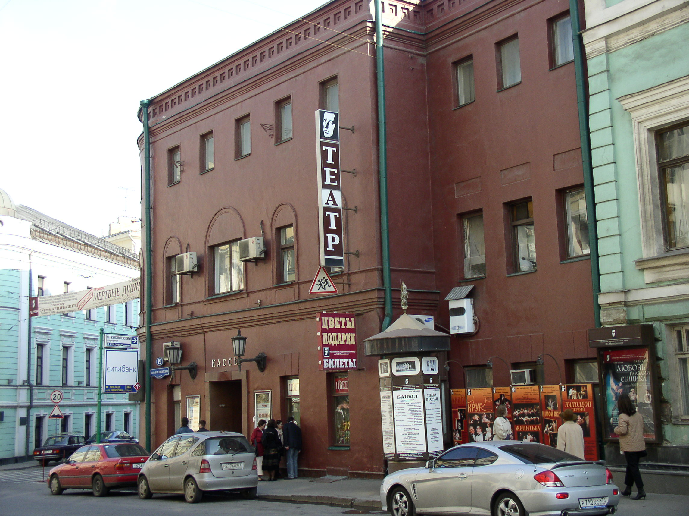 Majakowski-Theater